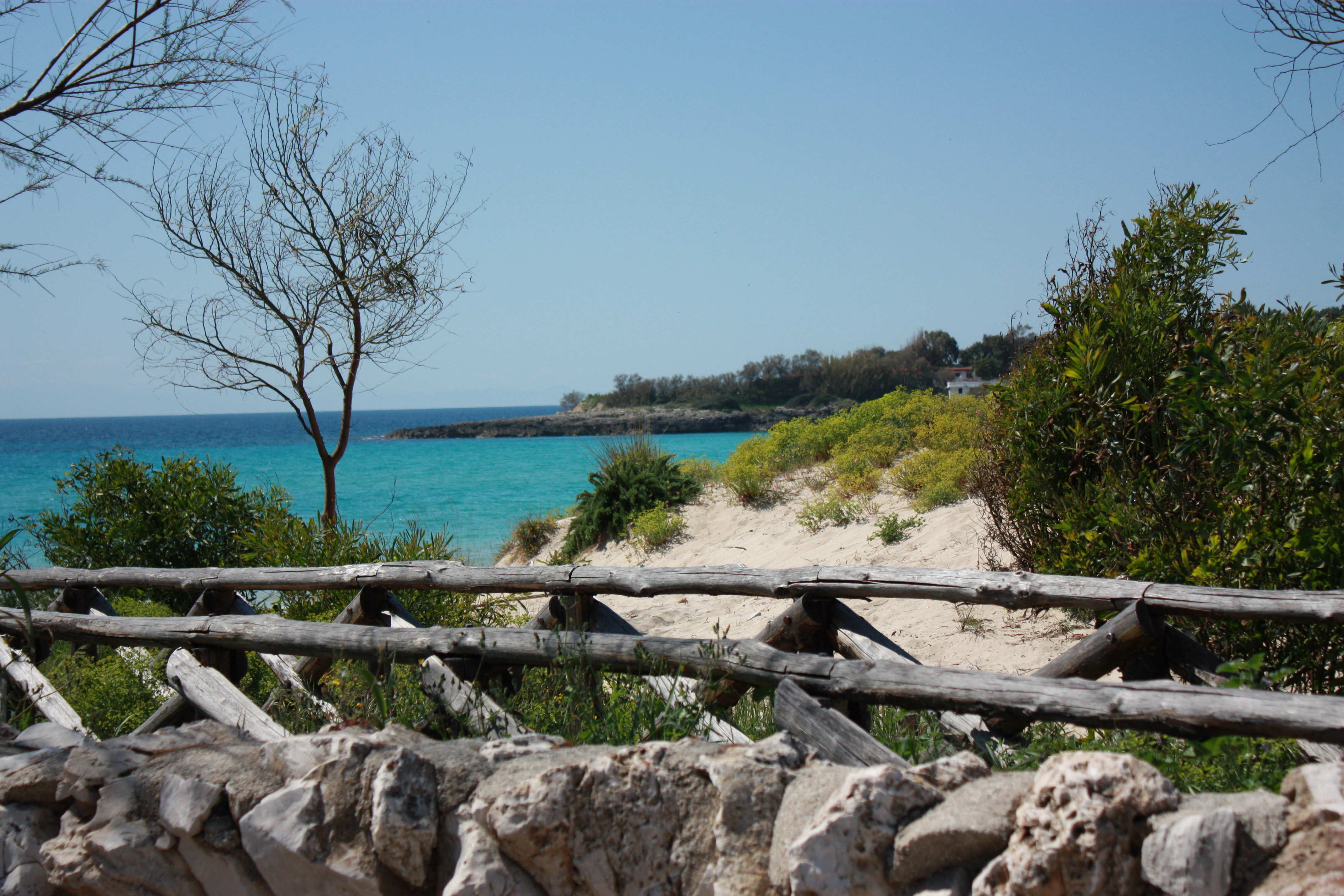 Vista della spiaggia Le Canne